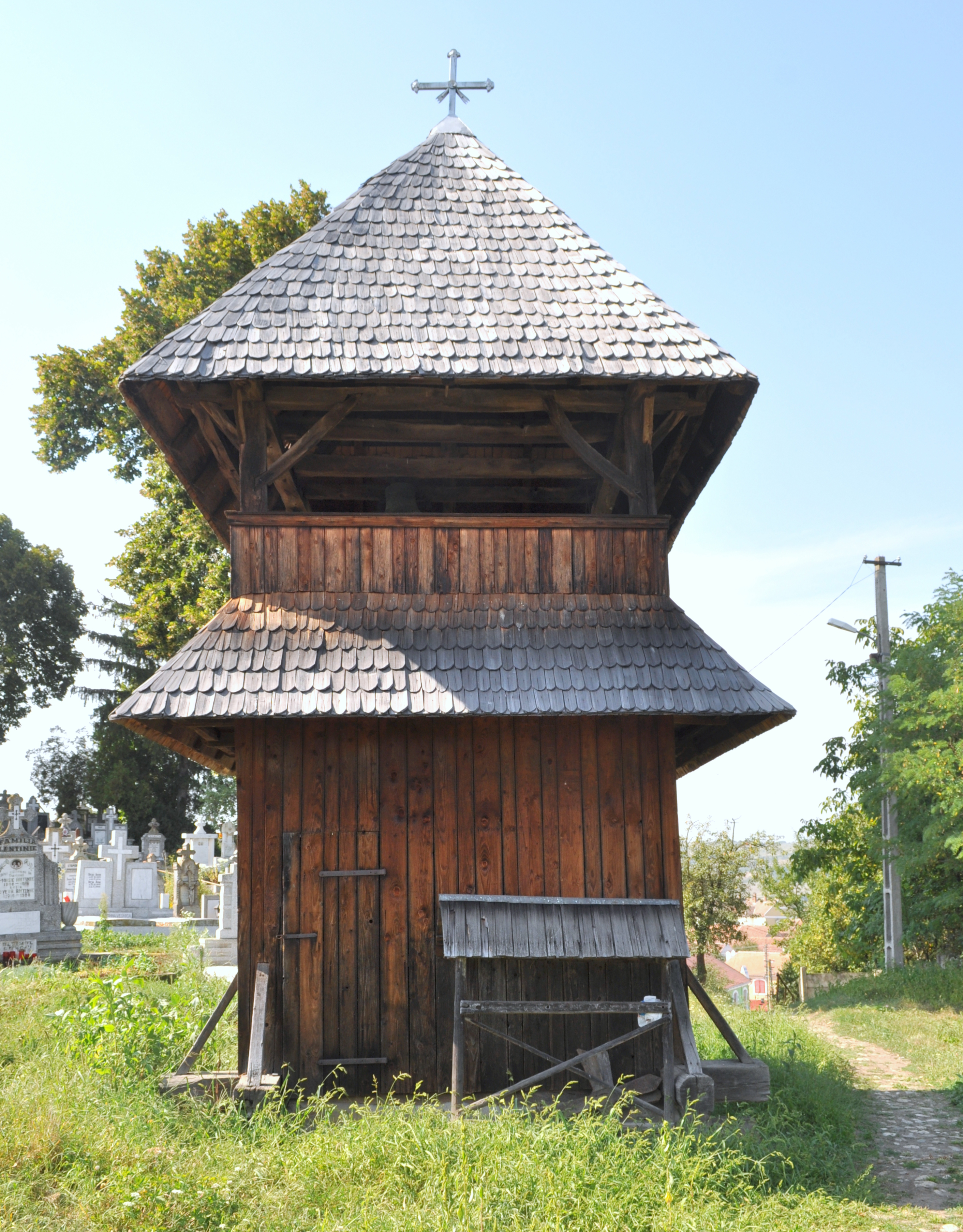 Biserica de lemn „Sfântul Ioan Evanghelistul” din Apoldu de Jos, comuna Apoldu de Jos, judeţul Sibiu